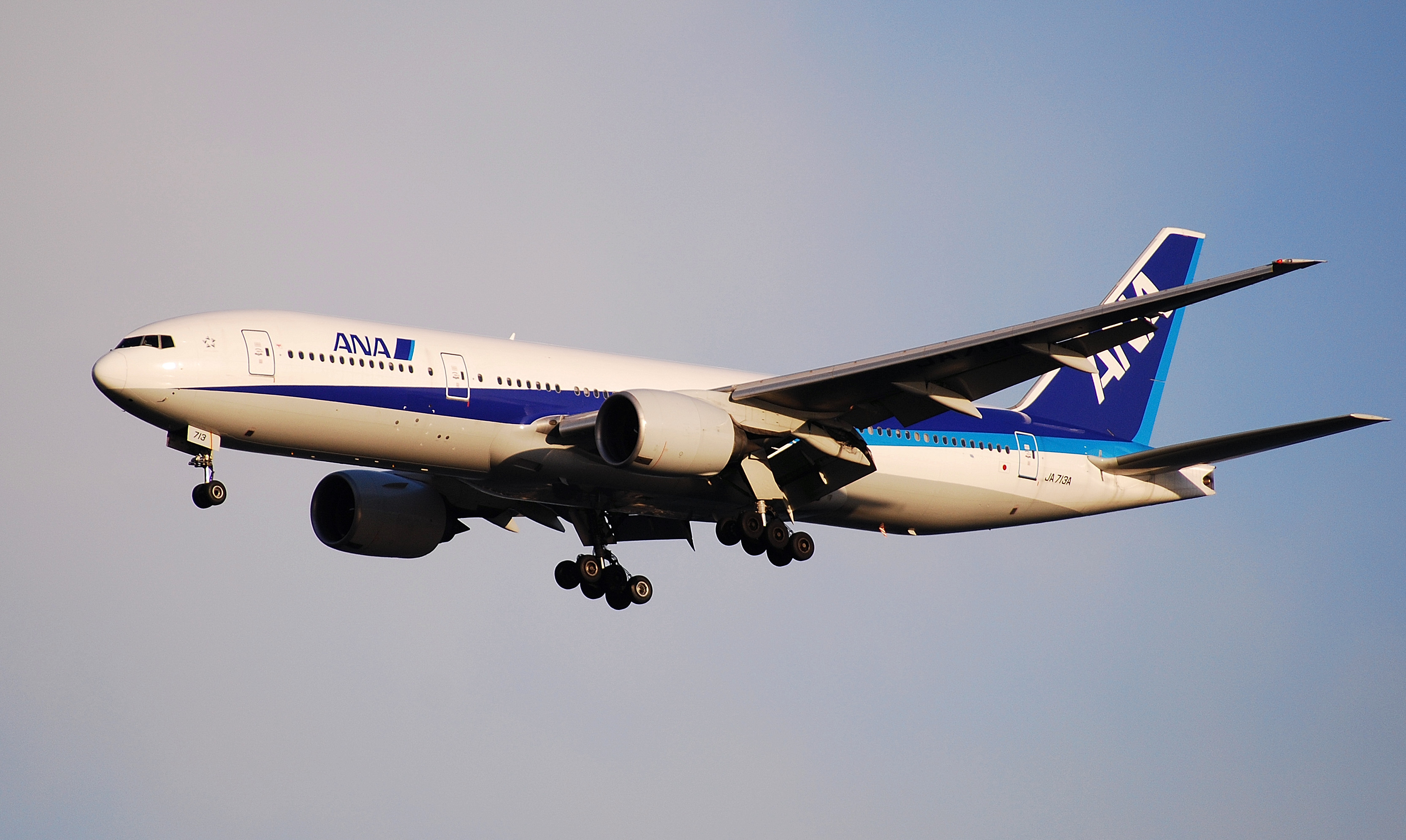 羽田空港に着陸する全日本空輸のB777